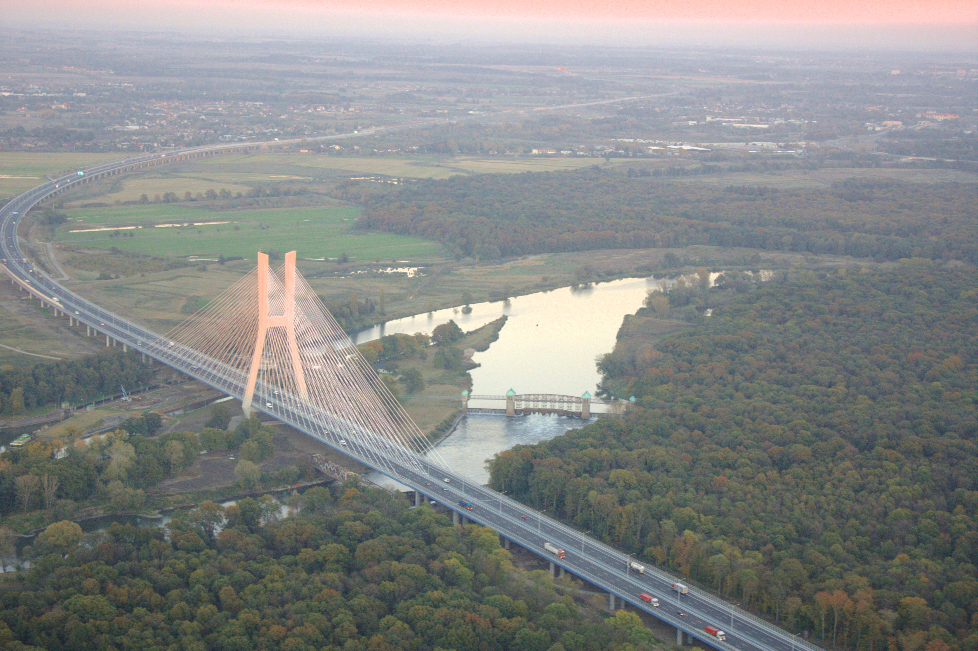 Rędziński Bridge